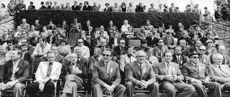 Friedensfahrt, Berlin, Ehrengäste ADN-ZB Mittelstädt 14.5.77-str Berlin: 30.Internationale Friedensfahrt -6.Etappe Neubrandenburg-Berlin über 129 km. Herzlich begrüßten am 14.5. Im Jahn-Sportpark 25.000 Zuschauer der Generalsekretär des ZK der SED und Vorsitzenden des Staatsrates der DDR, Erich Honecker (5.v.l.), sowie weitere Mitglieder der Partei-und Staatsführung. V.l.: Werner Lamberz, Rudolf Hellmann, Paul Verner, Franz Rydz, Erich Honecker, Joachim Herrmann, Erich Mielke, Günter Mittag. ( Funktionen und Protokoll siehe ADN-Meldung ).